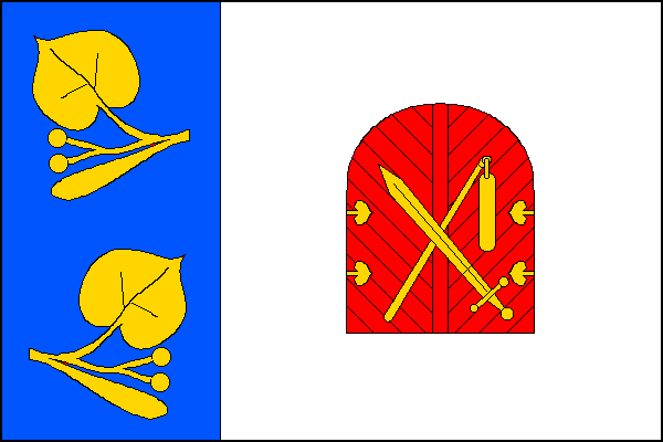 vlajka, Libel, okres Rychnov nad Kněžnou